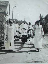 Primice Tichov